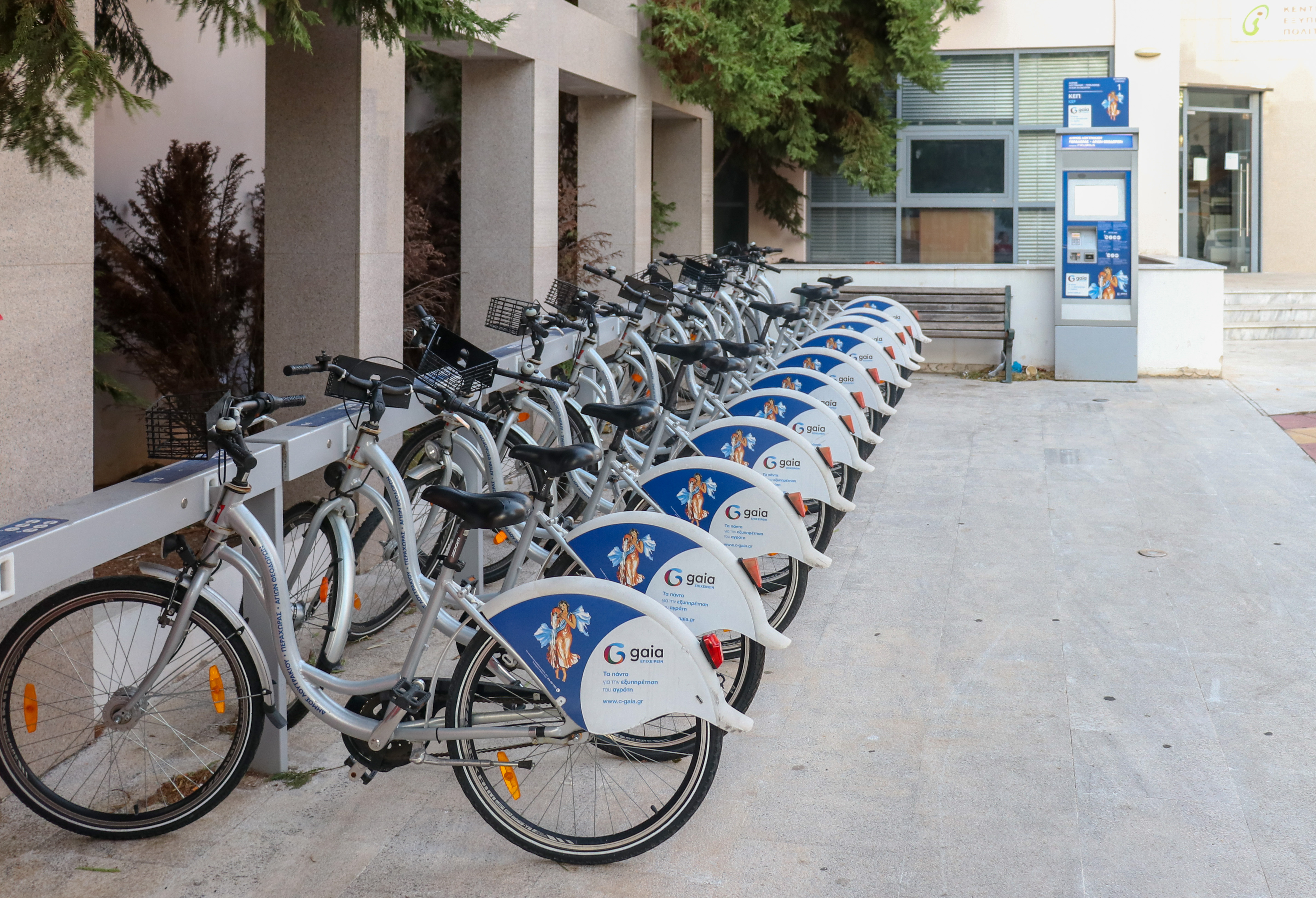 Краткосрочная аренда велосипедов в Лутраках